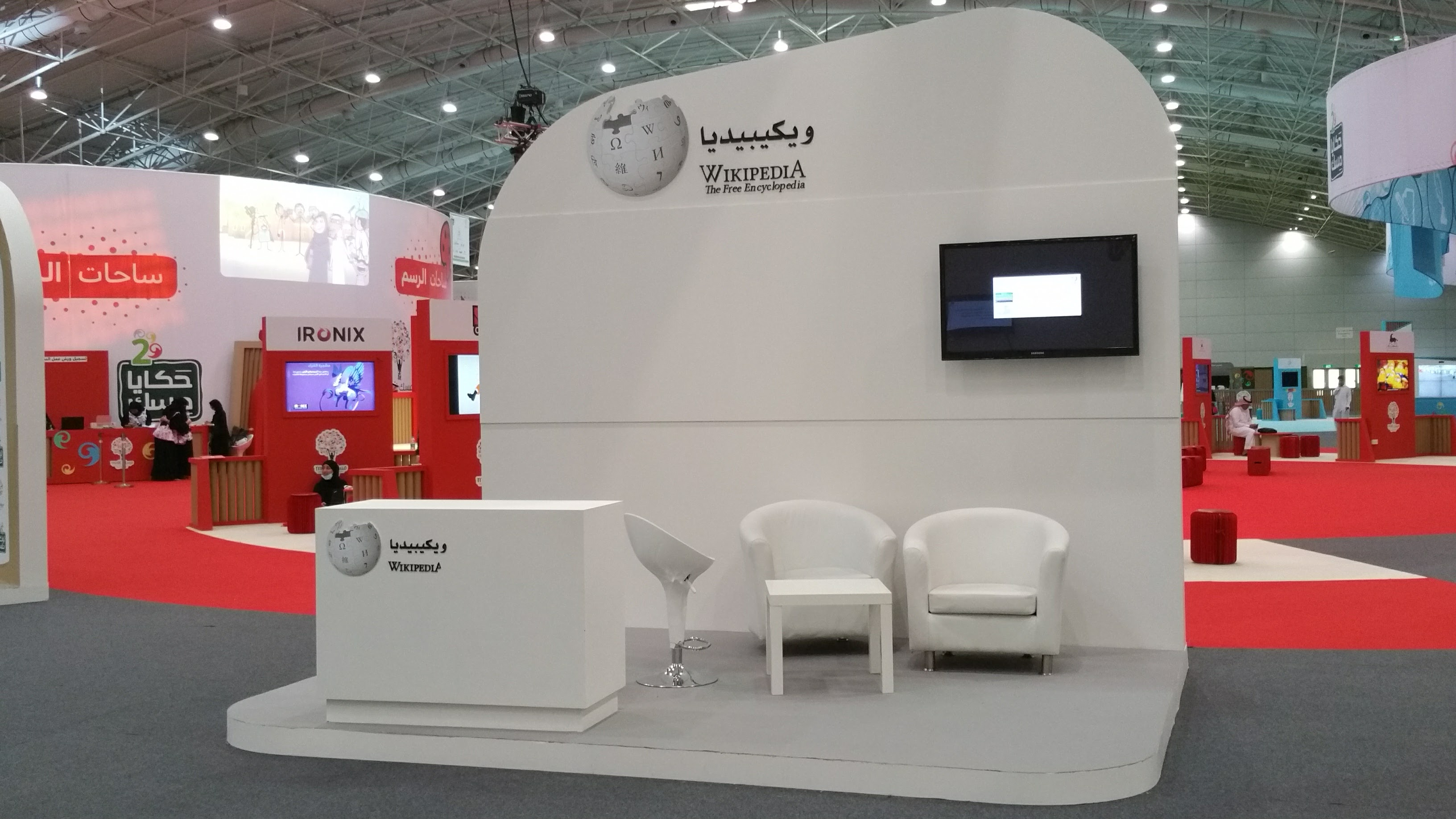 جناح ويكيبيديا في معرض حكايا مسك2 المُقام في الرّياض، 14-20 أغسطس، 2017م.